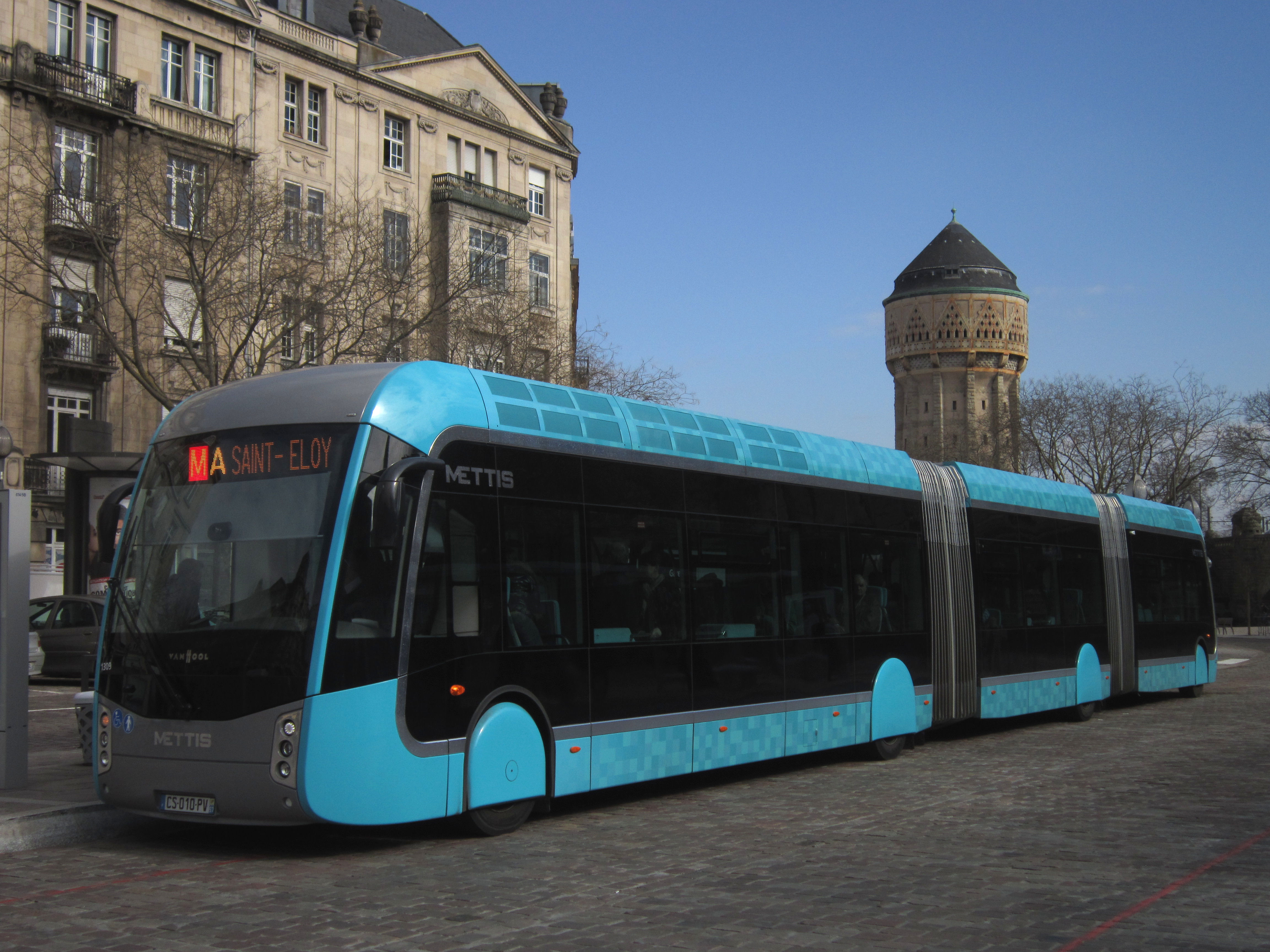 Van Hool Exquicity 24 n°1309 sur la ligne A arrivant à la station Gare.